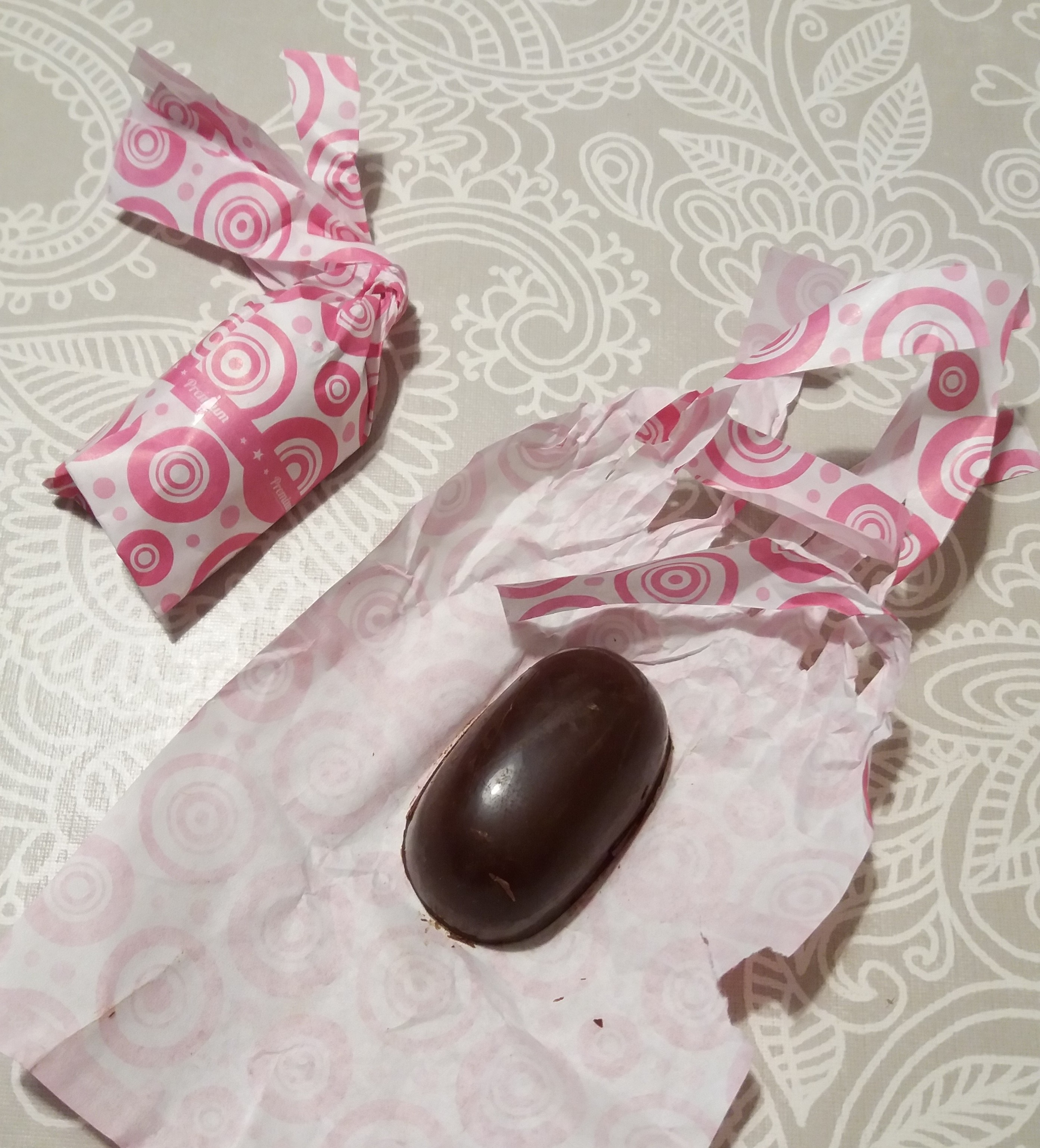 Dulce peruano